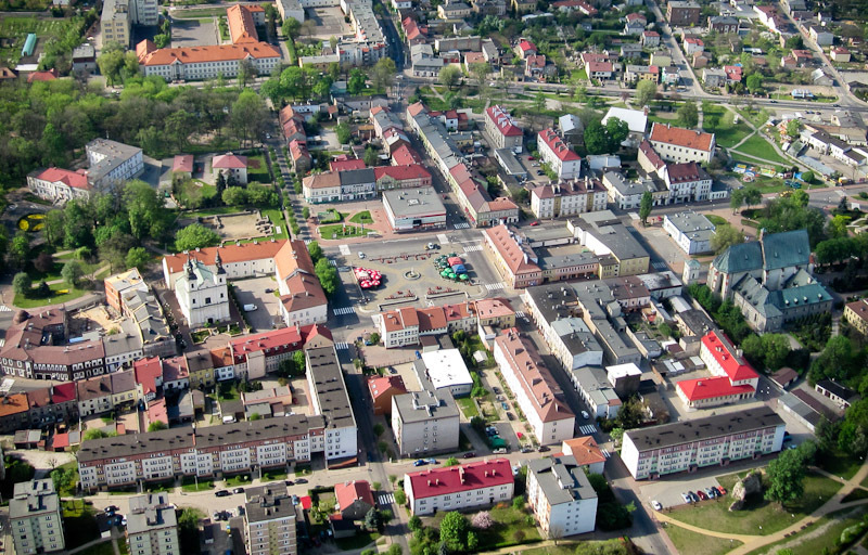 Wieluń - centrum miasta